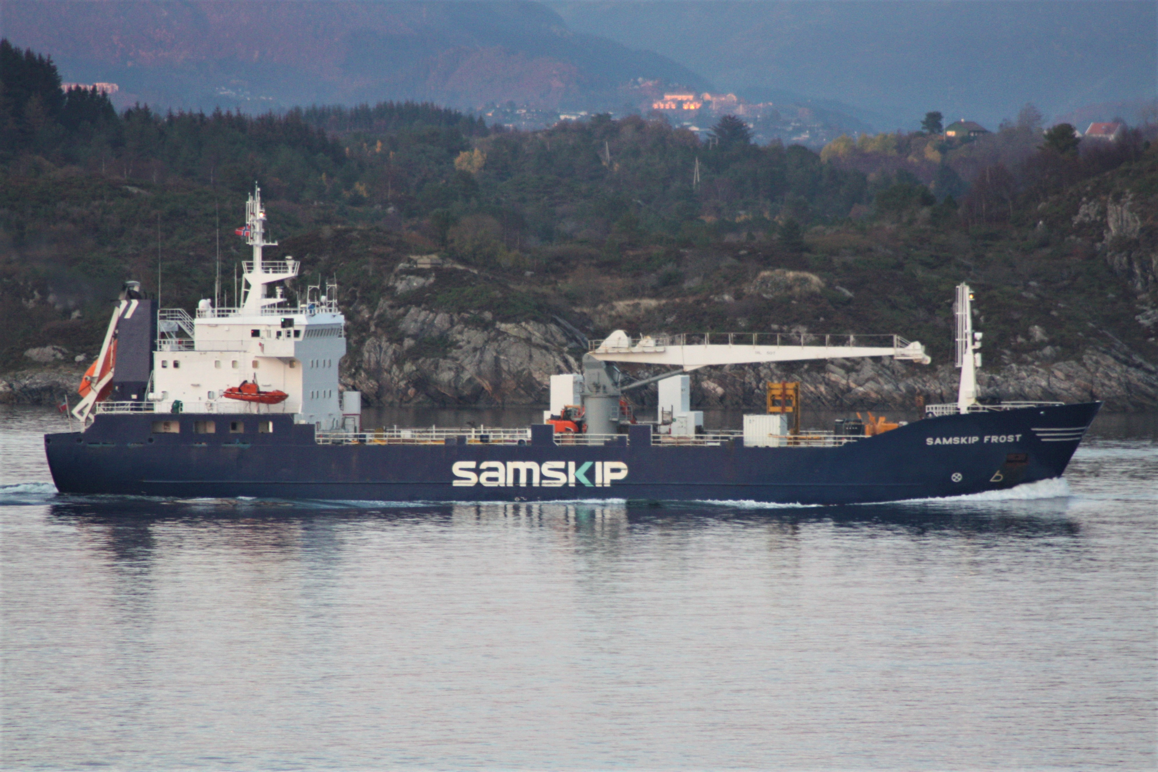 «Samskip Frost» i Korsfjorden